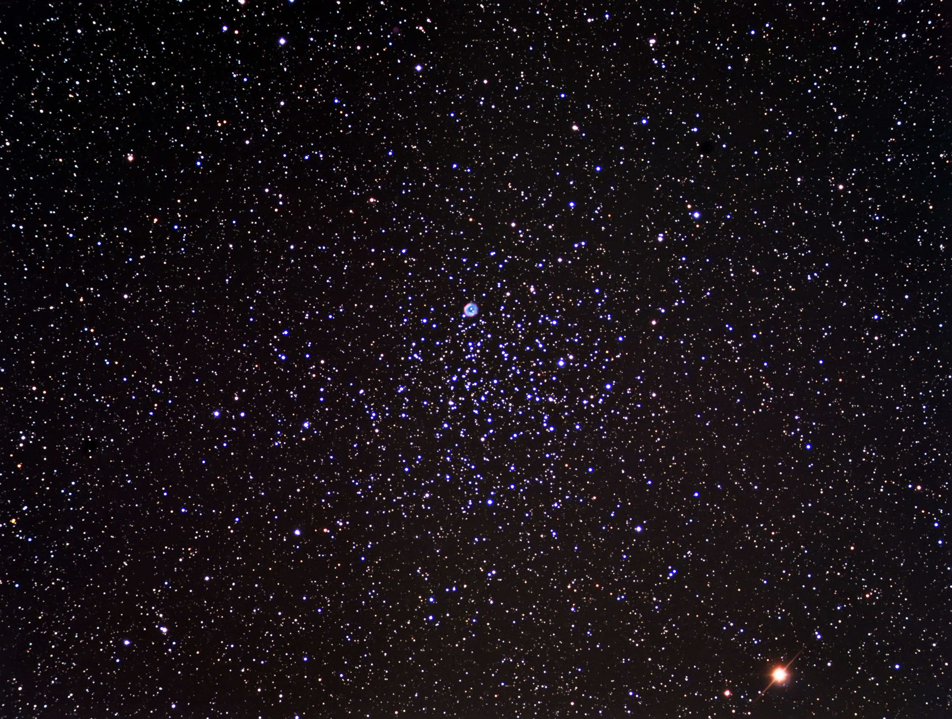 Cúmulo abierto M46, también conocido como NGC 2437